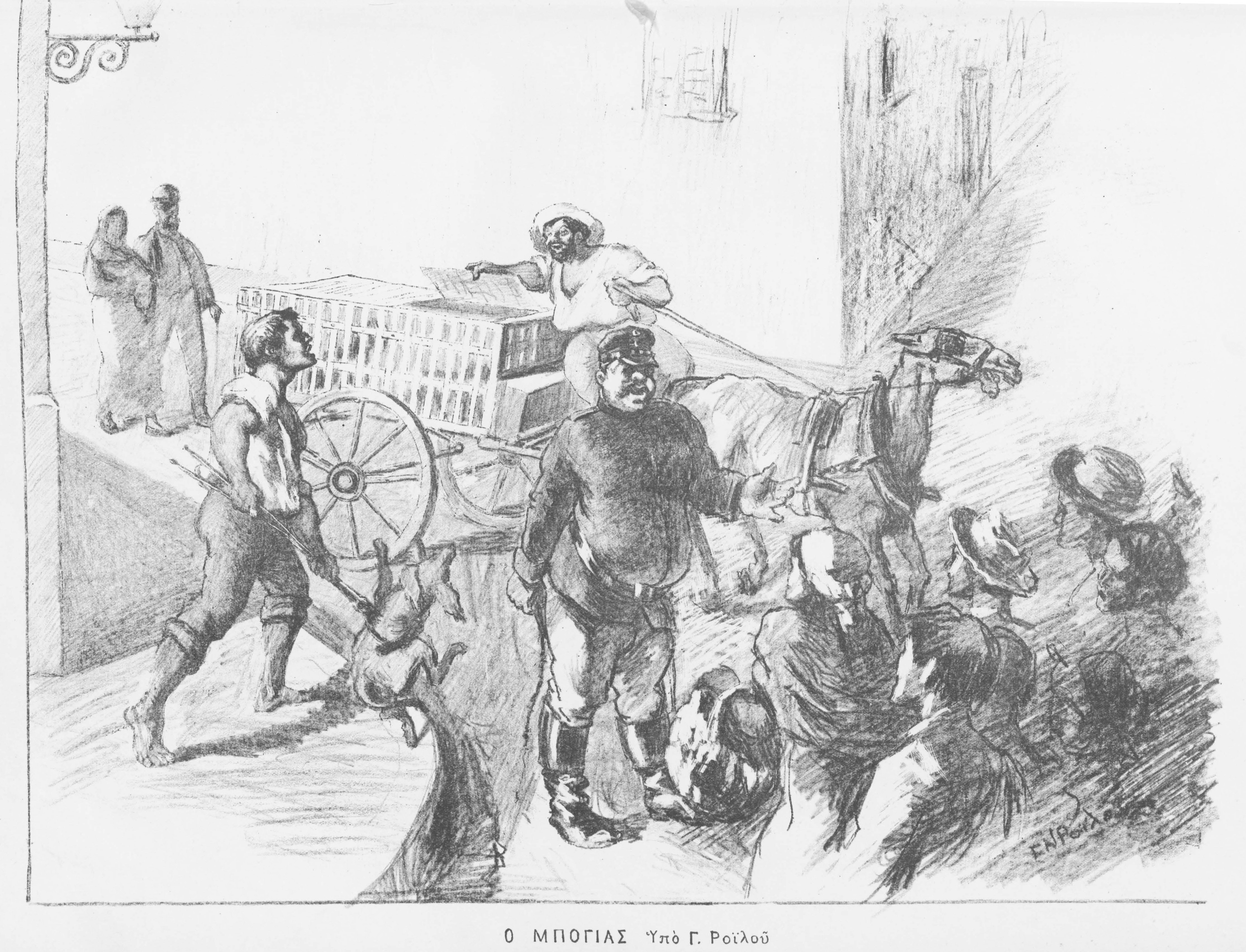 Ο Μπόγιας - der Hundefänger